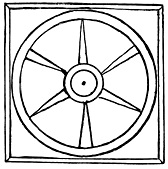 Radschema des Meditationsbilds des hl. Niklaus von der Flüe, Augsburg 1488